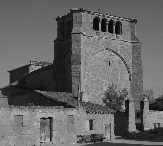 Iglesia Parroquial de Nuestra Sra de la Asuncion - Pozuel de Ariza